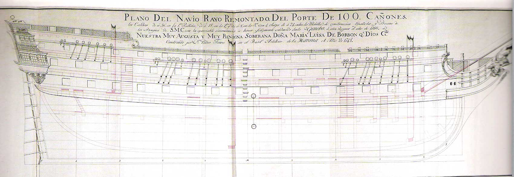 Dirección completa de la ubicación en la Real Biblioteca